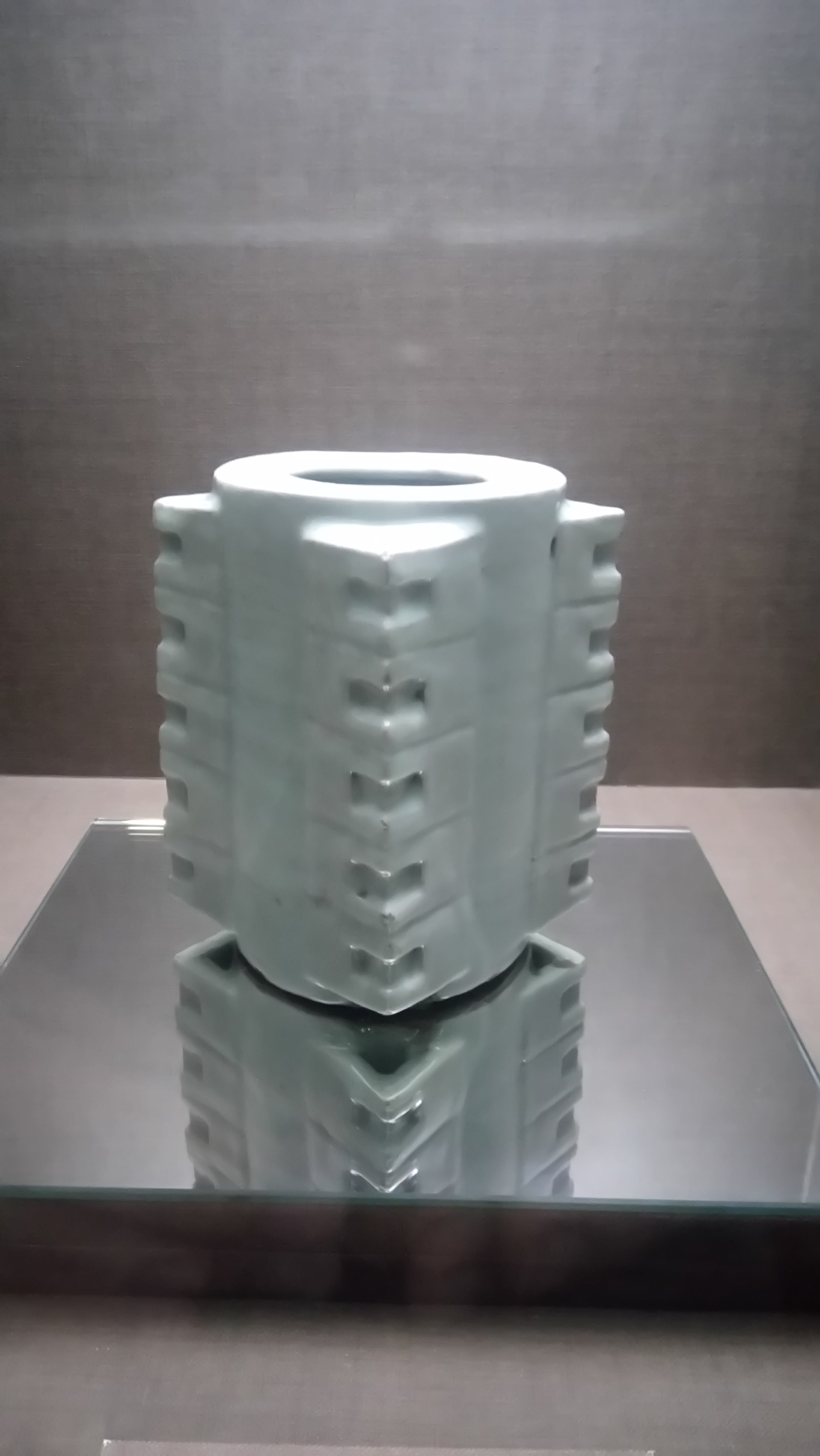 琮式瓶正面